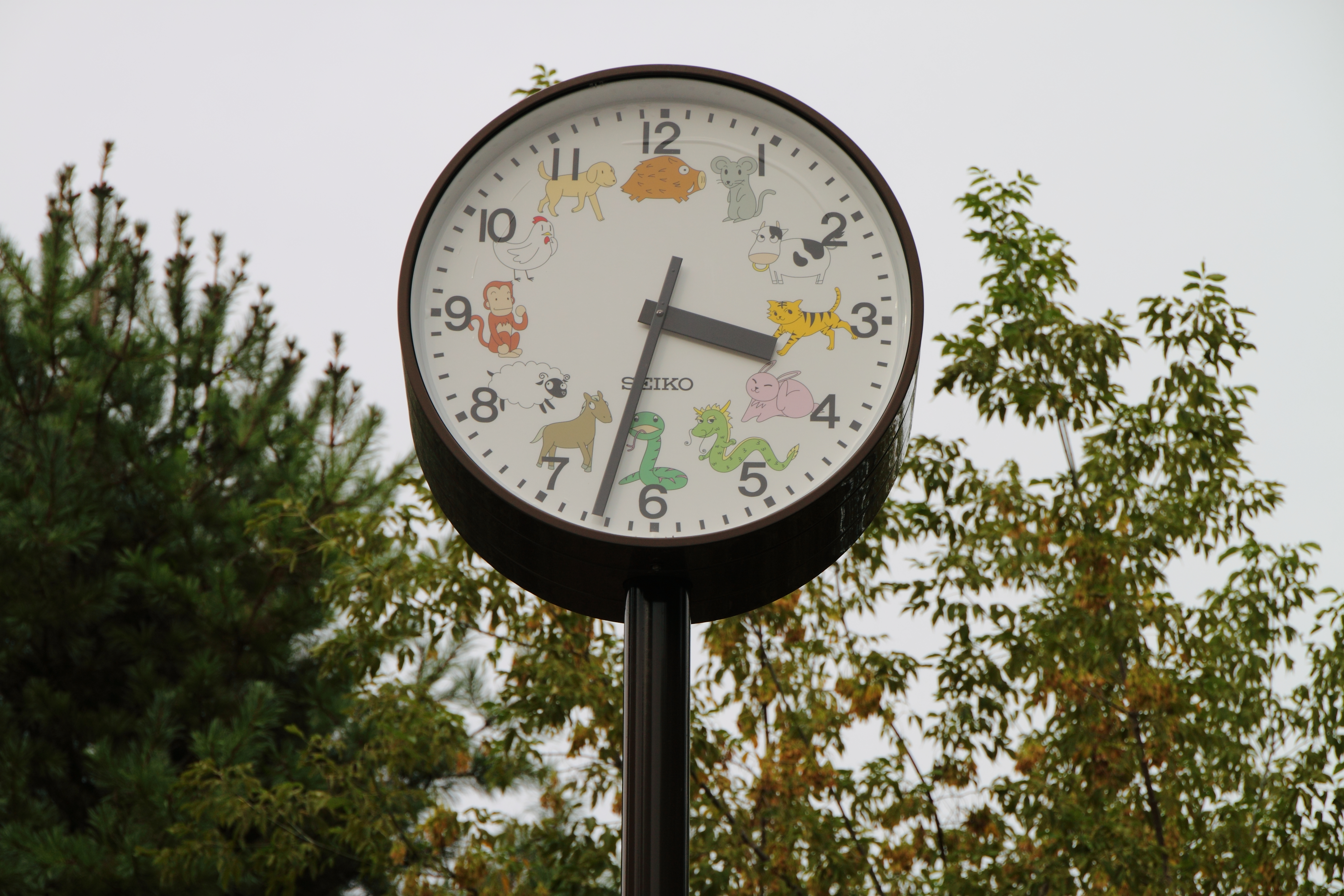 文字盤が十二支になってるのね。 ＠おびひろ動物園